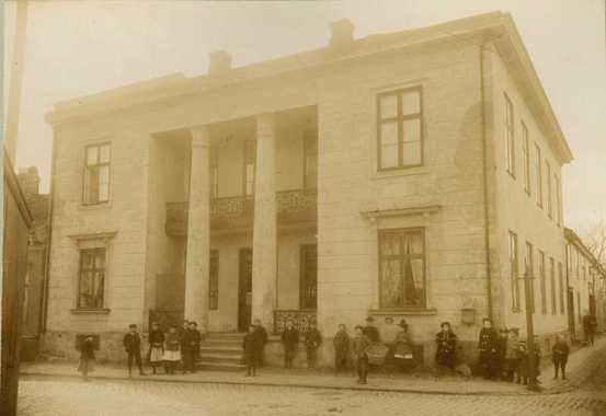 Søylegården, Svenskegaten 10, Halden, Østfold. Tegnet av arkitekt Grosch ca. 1830. Foto fra Den kulturhistoriske Udstilling på Norsk Folkemuseum i 1901. Tilhører Norsk Folkemuseum